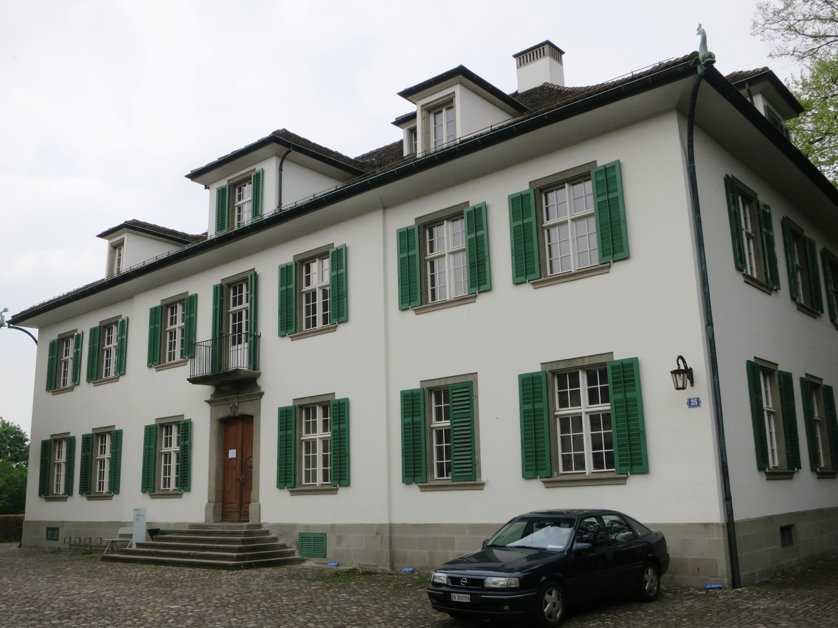 Beckenhof, Zürich-Unterstrass, Schweiz